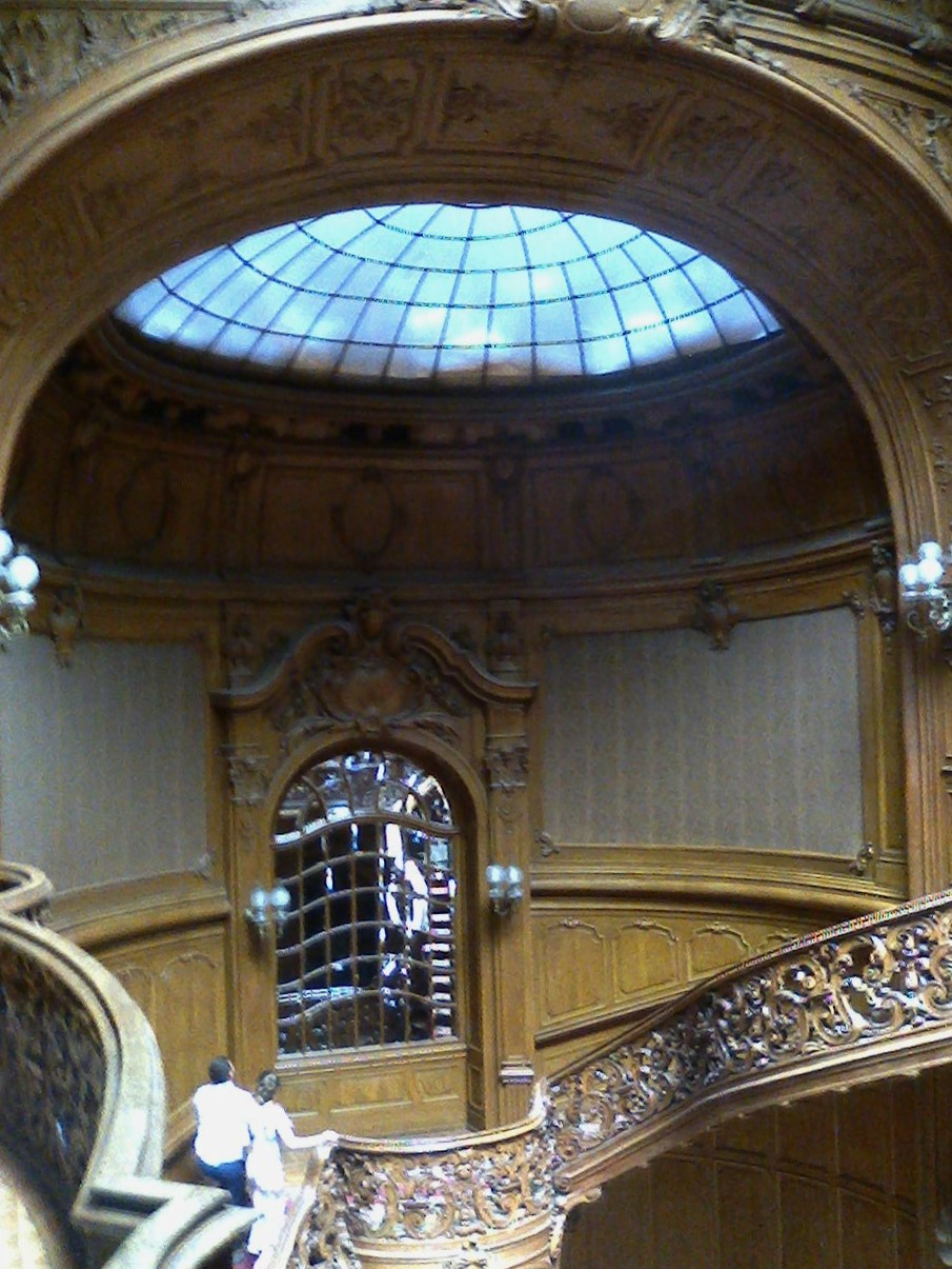 Lwów. Kasyno szlacheckie